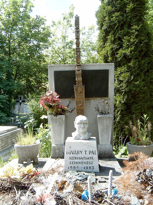 Tóváry Pál, id. (Tóbiás) (Jászkisér, 1899. január 25.–Budapest, 1983. február 10.) színész, színházigazgató sírja Budapesten. Új köztemető: 58/VIII-1-103/104.